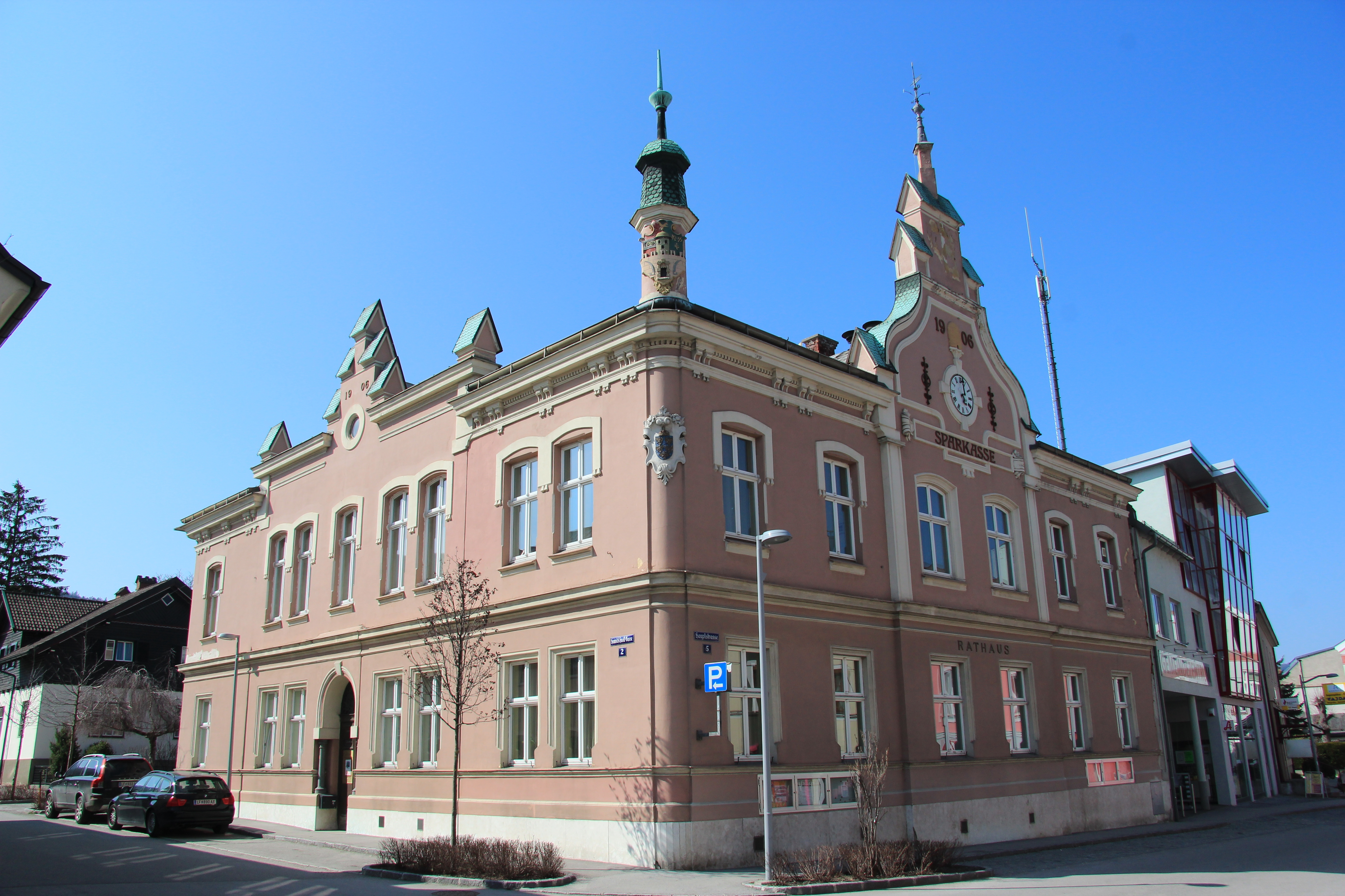 Rathaus in Hainfeld, Niederösterreich